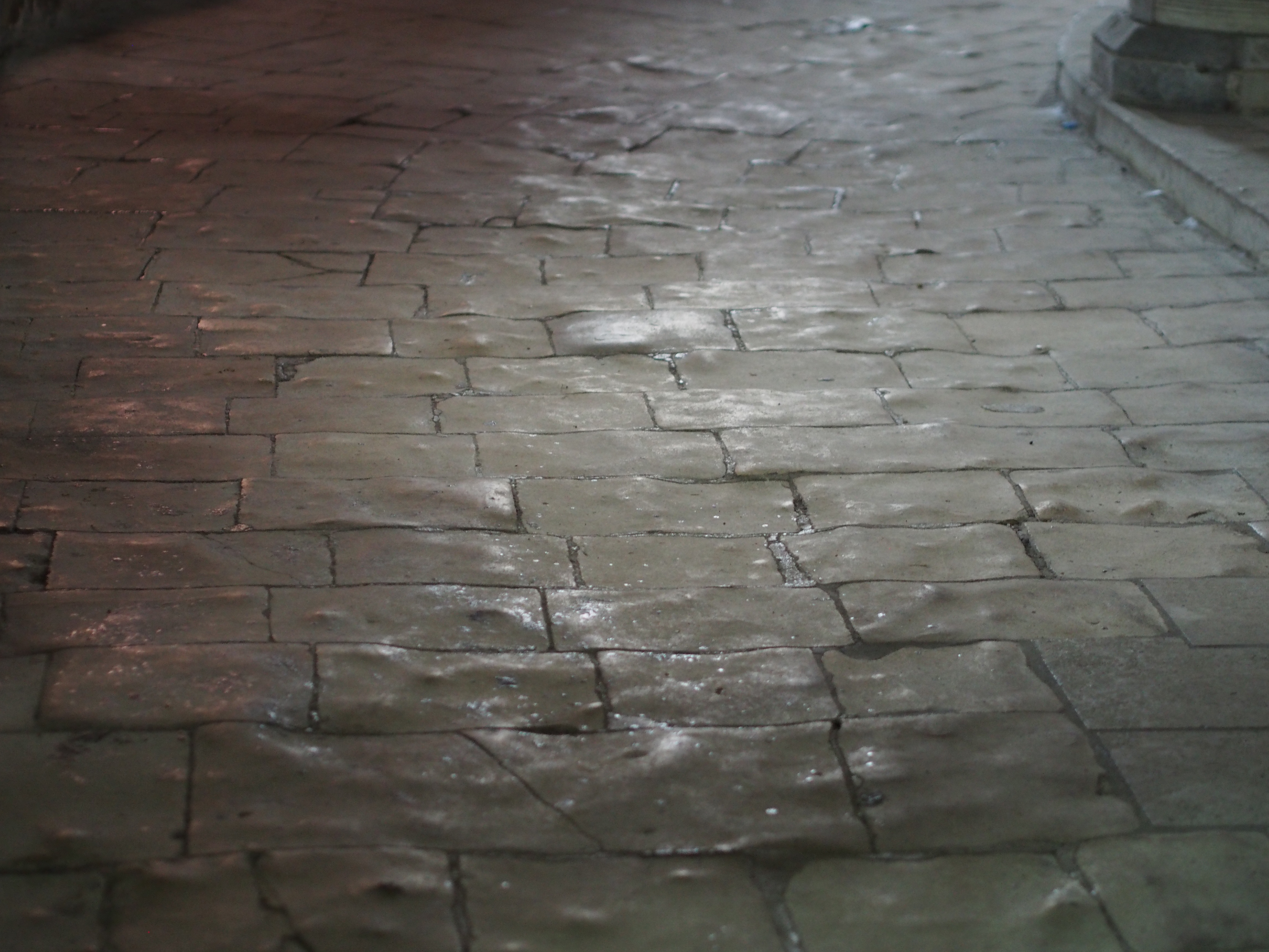 Pavement de l'église Saint-Étienne de Nevers (France).